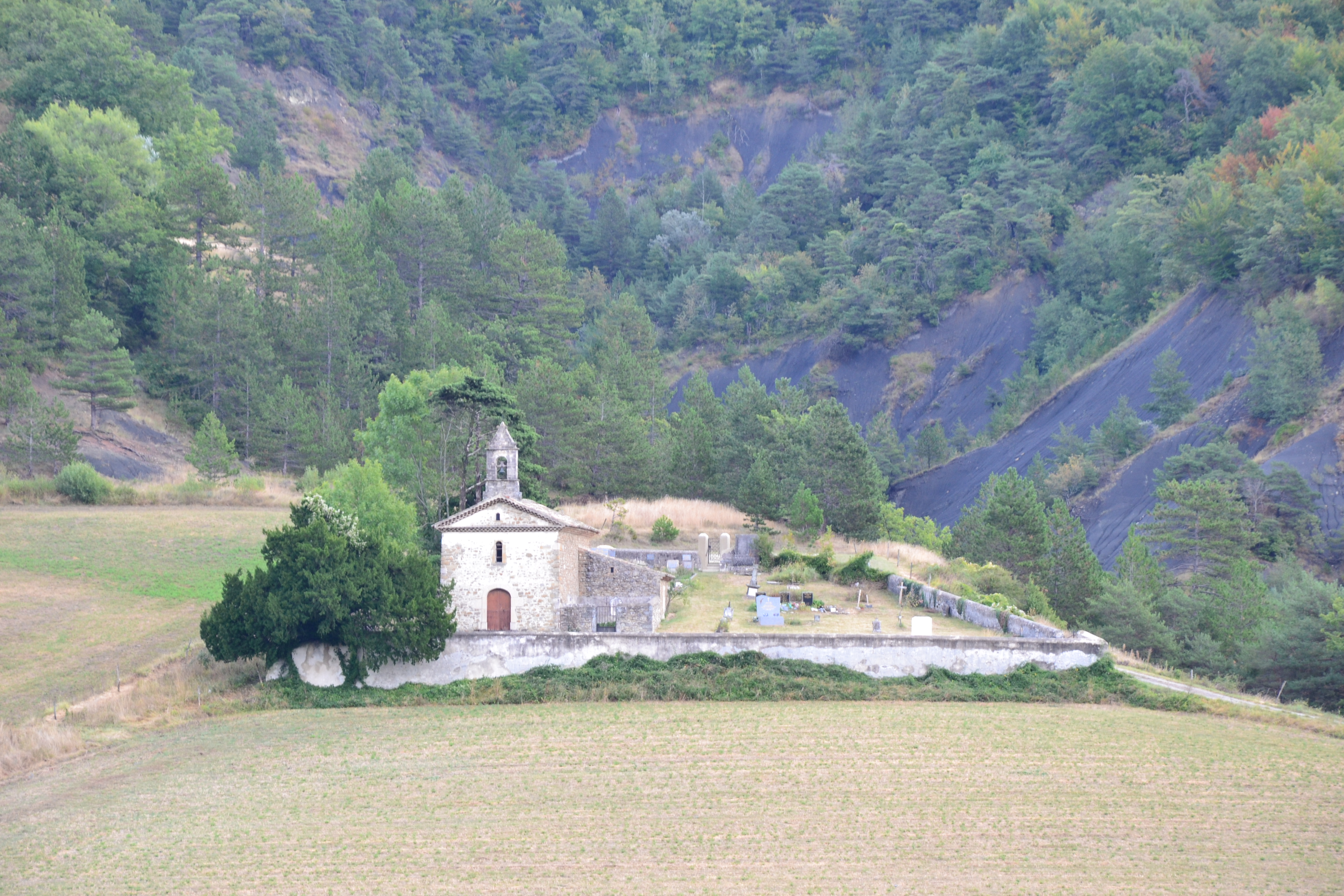 Chapelle Saint Antoine à Félines-sur-Rimandoule